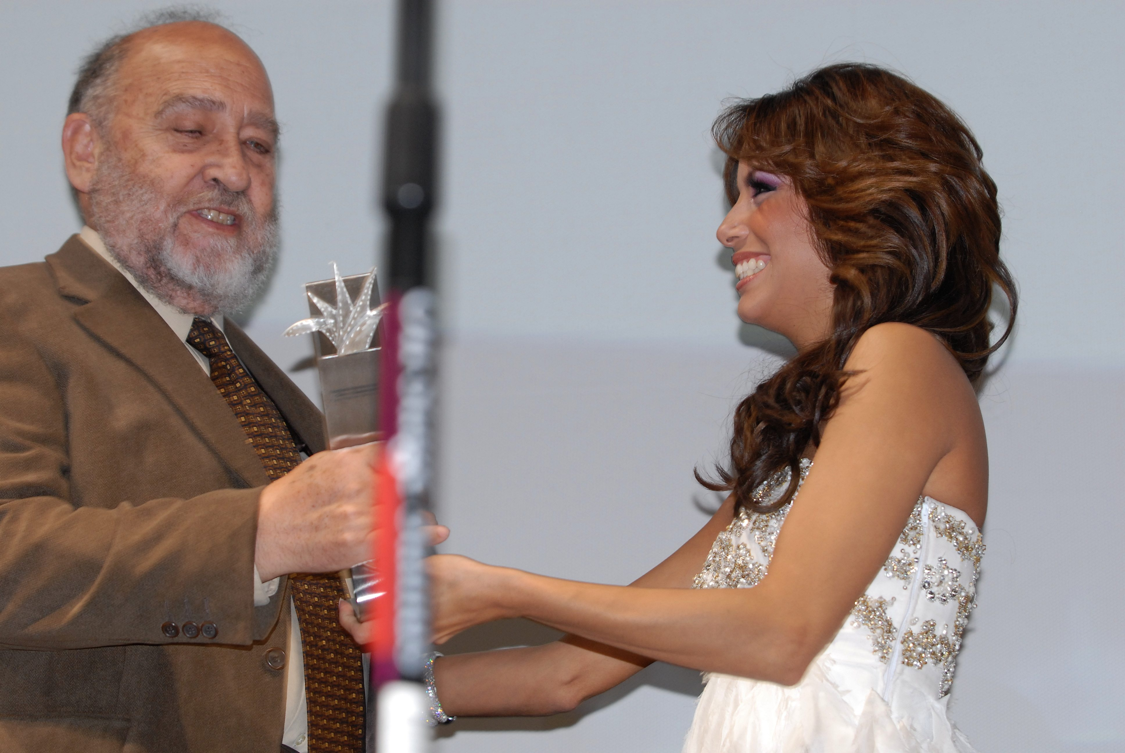 21/03/09 El Doctor Manuel González Casanova recibe el Mayahuel de Plata por su trayectoria en el estudio de la cinematografía en México durante la función de gala de la película The Perfect Game, 21/03/09 El Doctor Manuel González Casanova recibe de manos de Eva Longoria el Mayahuel de Plata por su trayectoria en la cinematografía mexicana en la Gala de la proyección de la película The Perfect Game